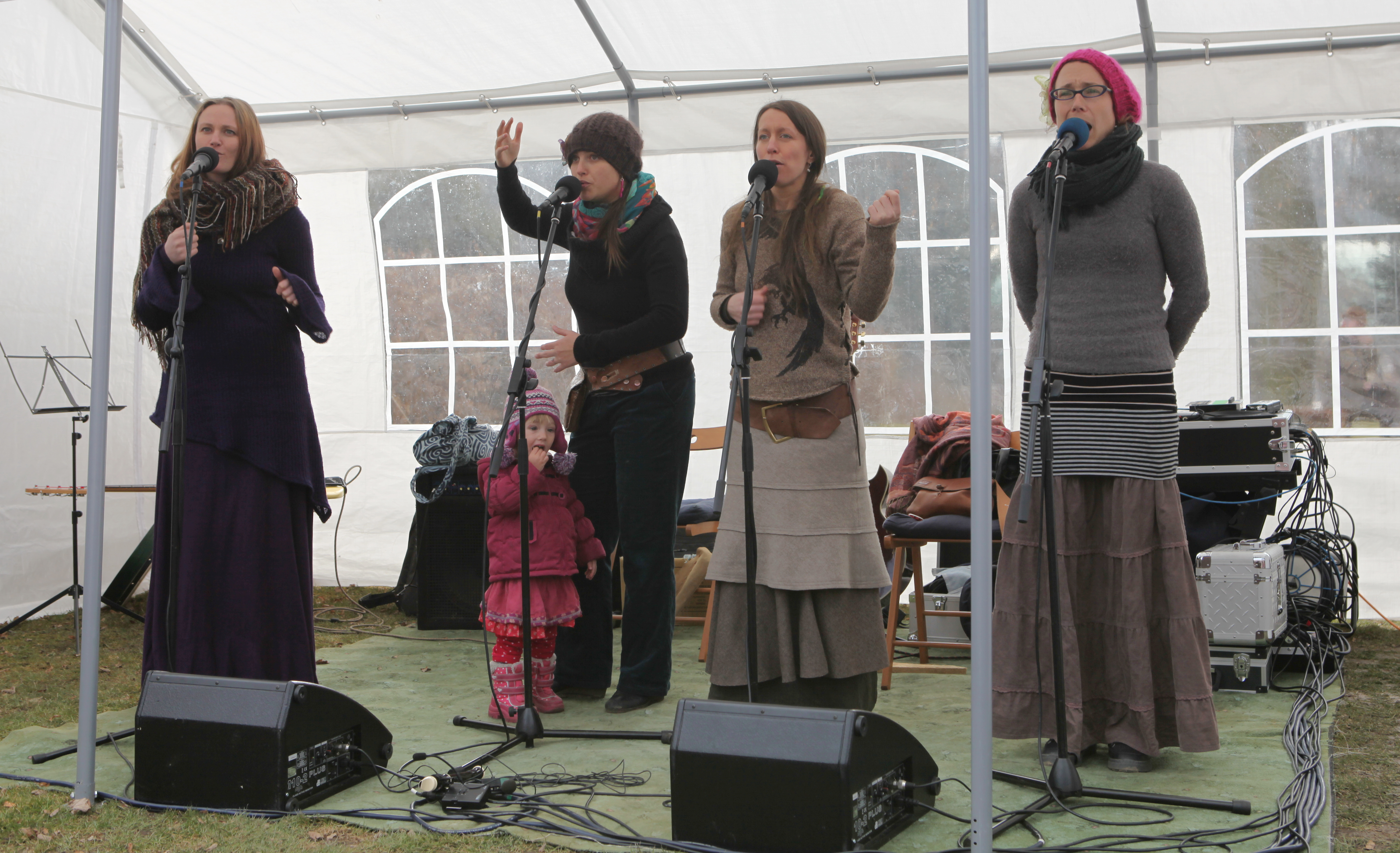 Yellow Sisters na Velikonočním jarmarku, Spolkový dům Roškotových Vlašim. Foto: Vít Švajcr